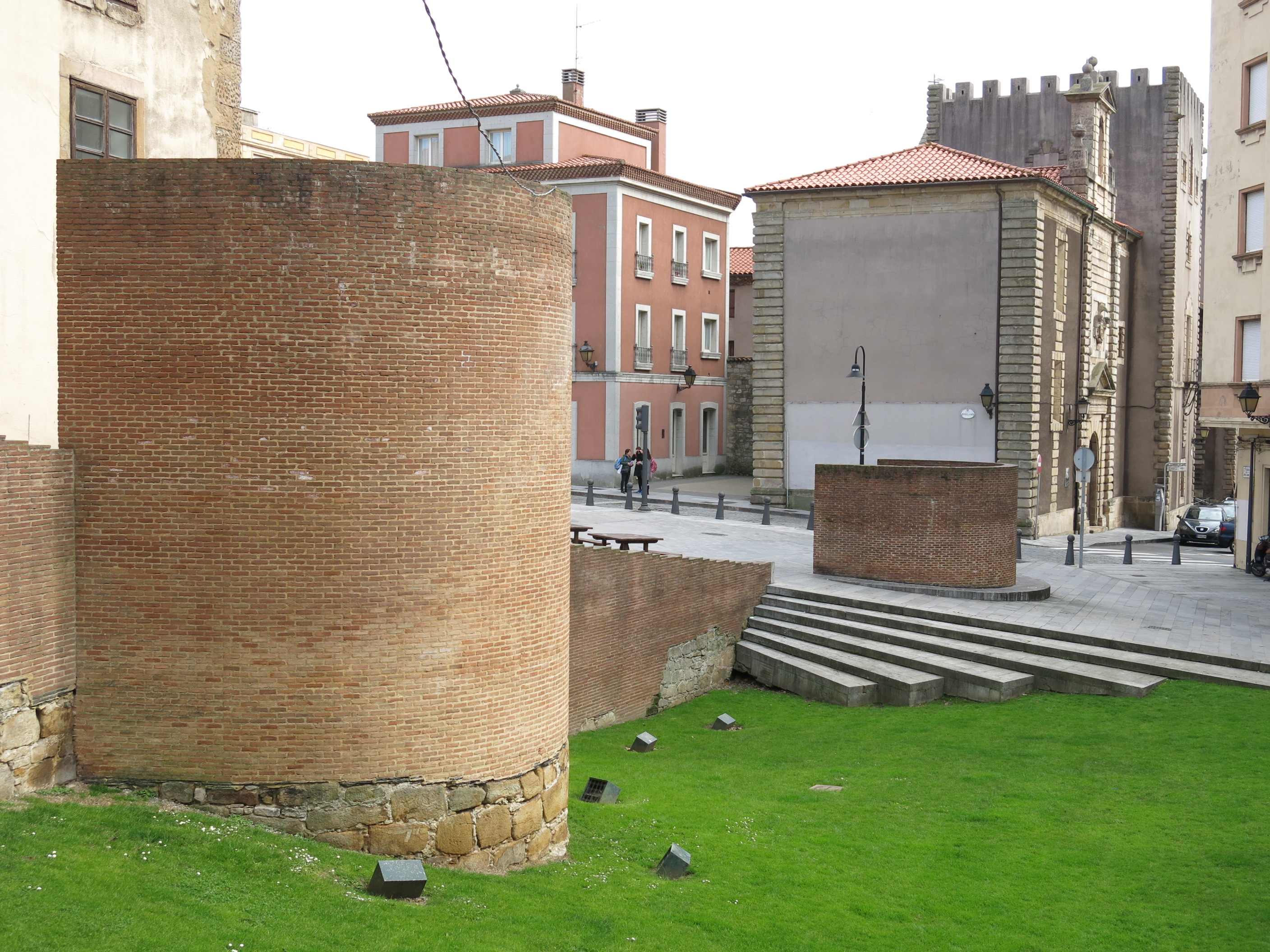 Conjunto Histórico Artístico El Barrio Viejo de Gijón